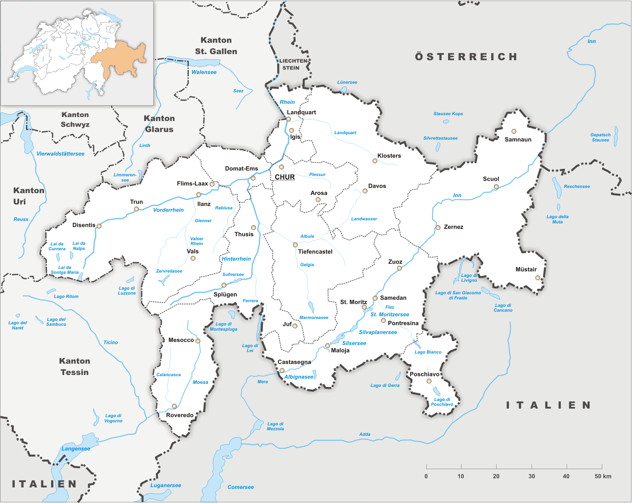 Karte des Kanton Graubünden.